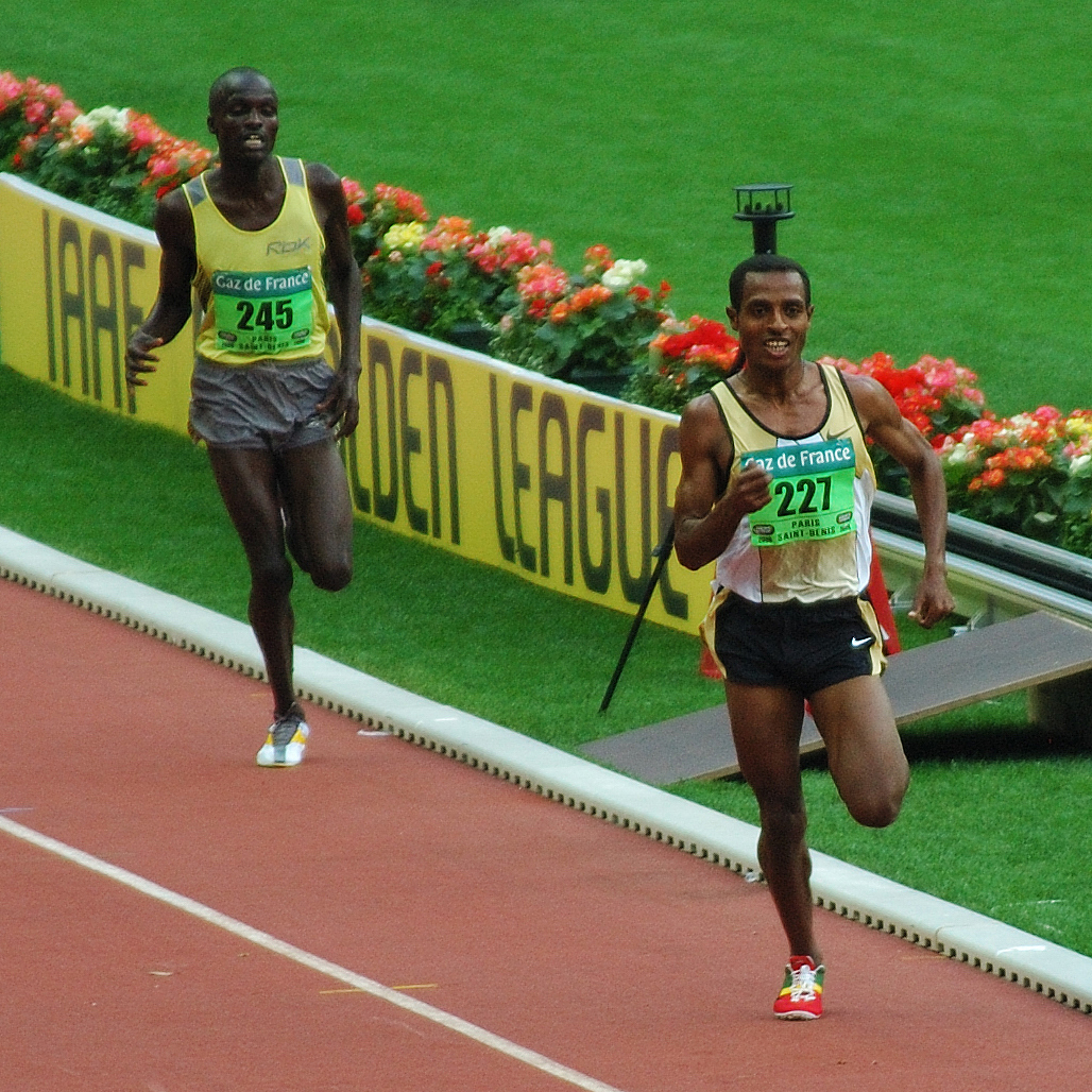 Kenenisa Bekele at Golden League 2006, Gaz de France, Paris Saint Denis.